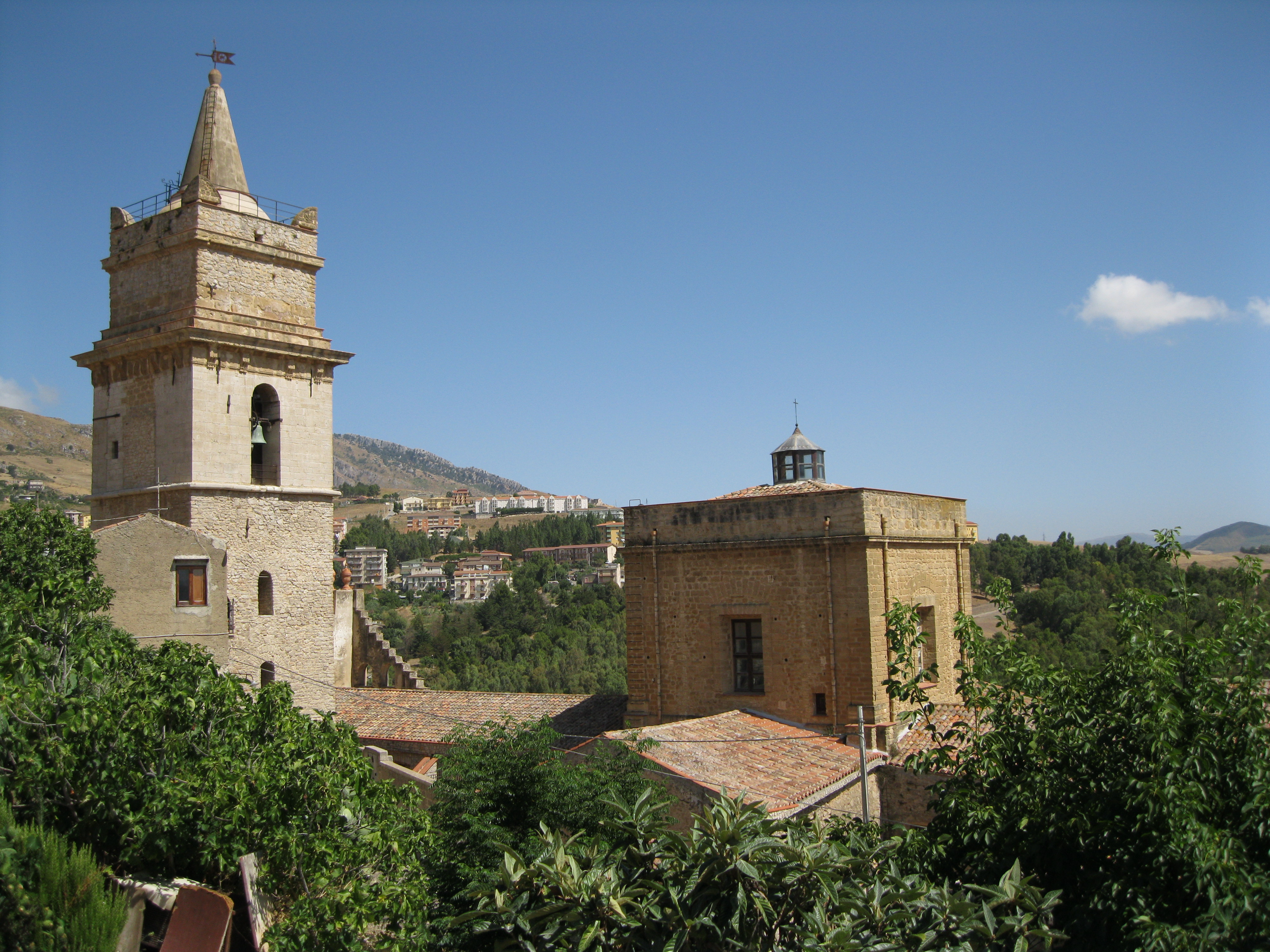 Il duomo di San Giorgio Martire a Caccamo, nella città metropolitana di Palermo.